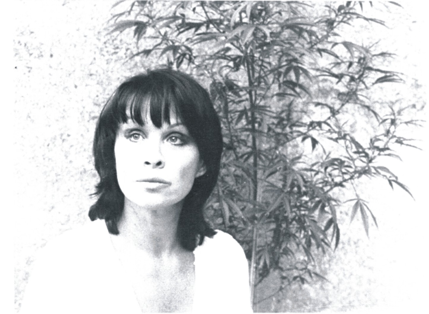 Bild von der Schauspielerin Helena Rosenkranz